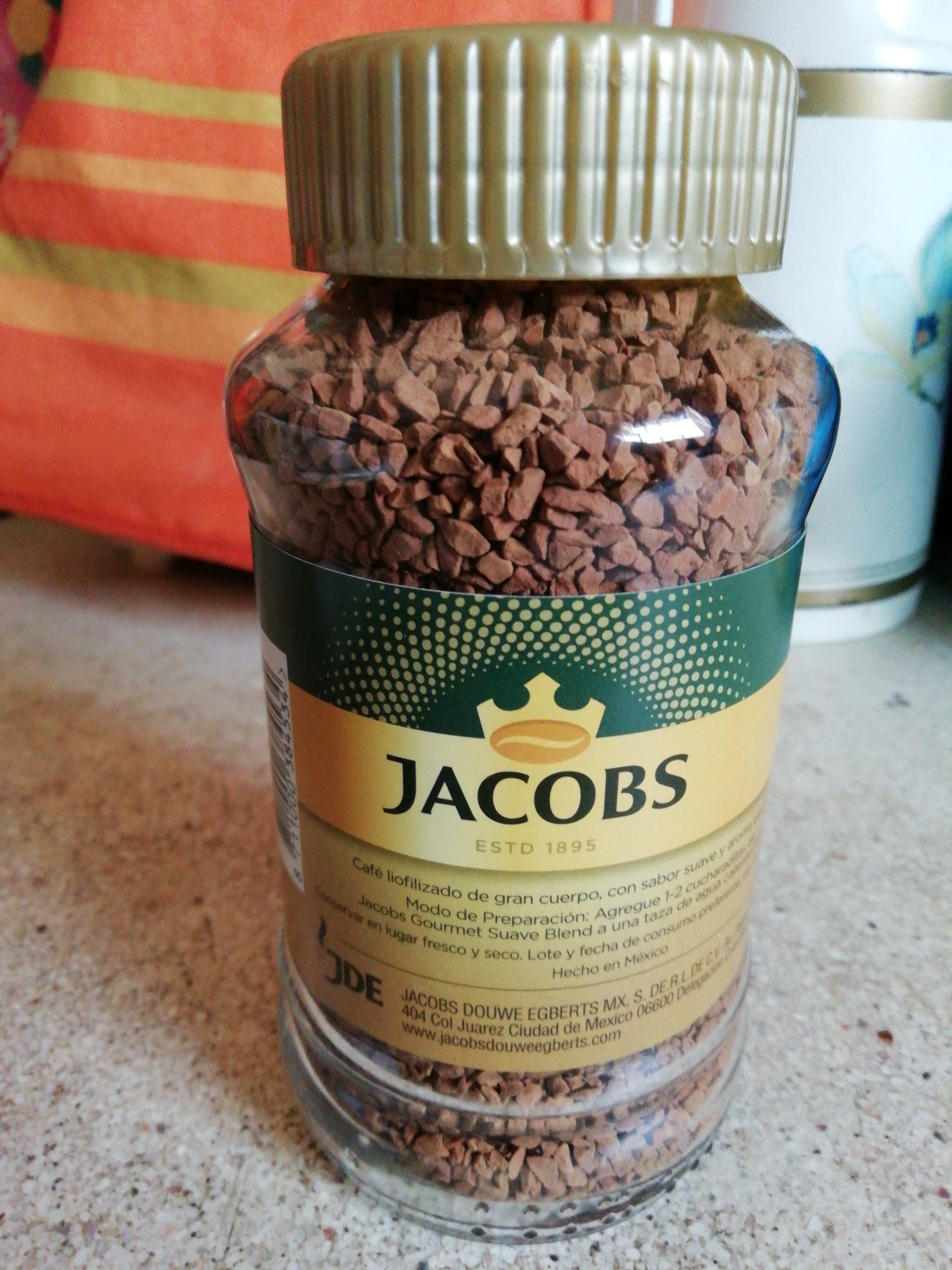 Café Jacobs